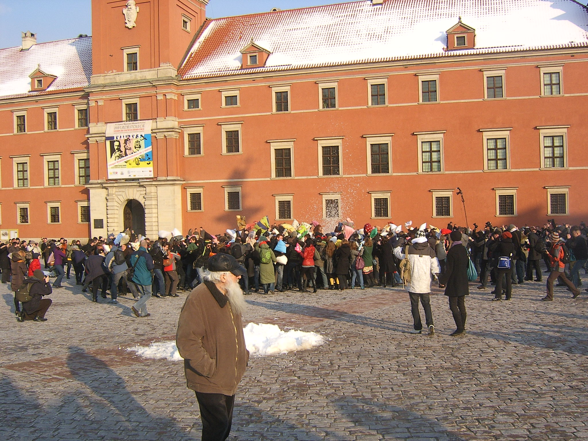 Wielka Joemonsterowa bitwa na poduszki na Placu Zamkowym w Warszawie